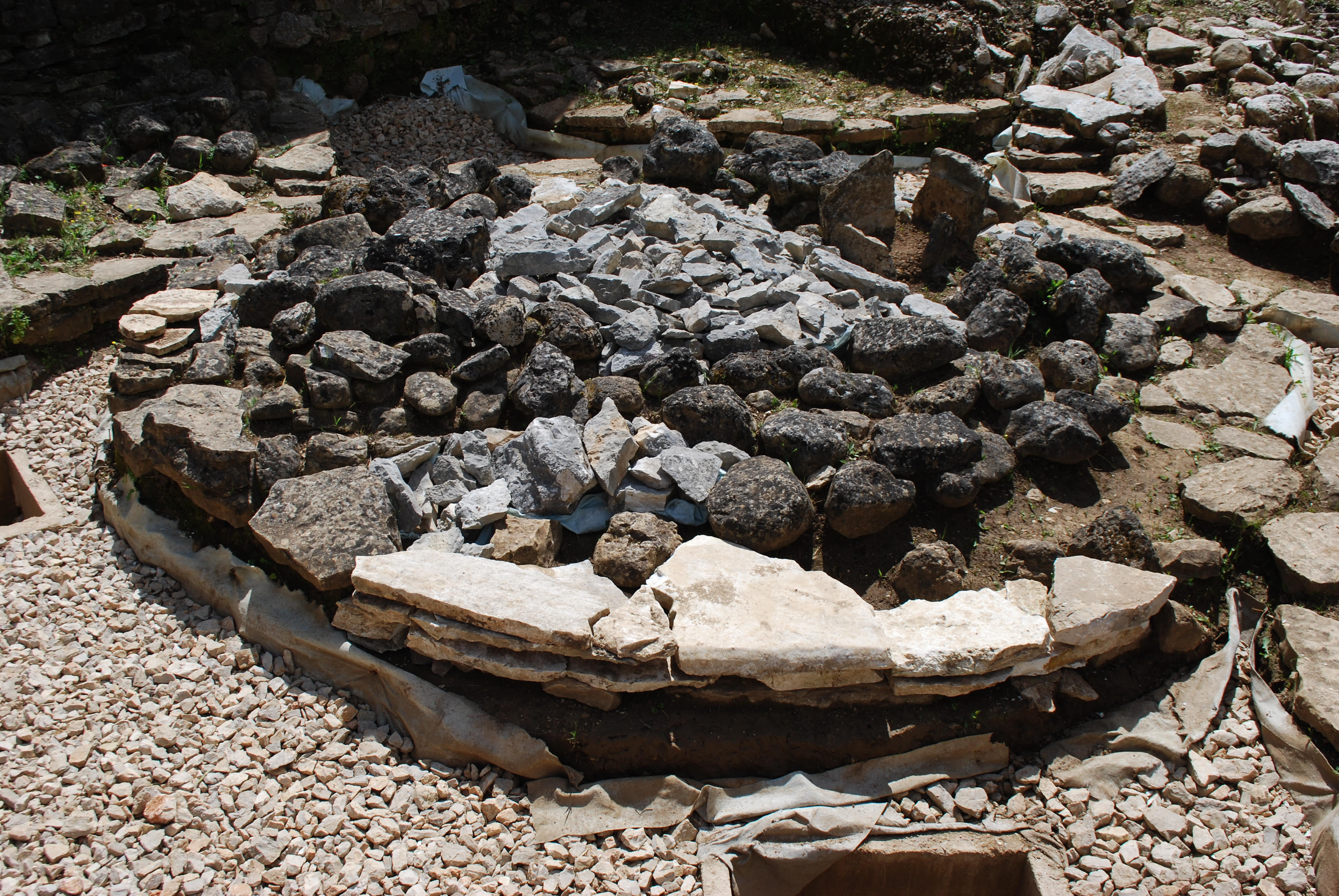 Vue de Nydri.